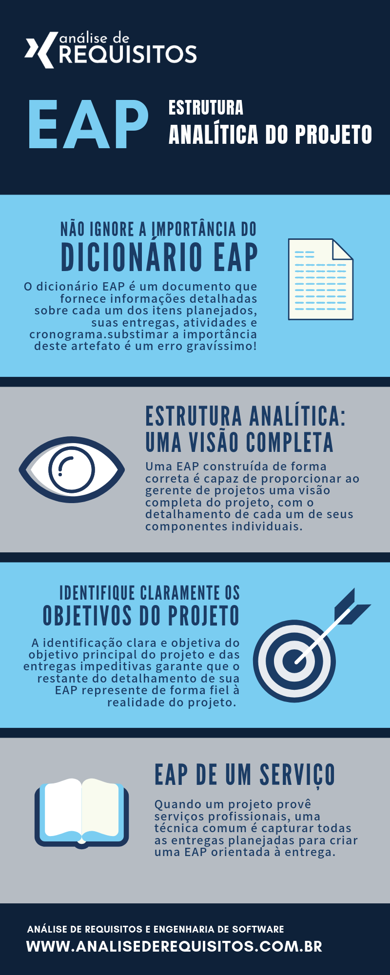 Infográfico lúdico que reforça de forma visual as 4 principais características indispensáveis para a realização de uma EAP eficaz para um projeto.